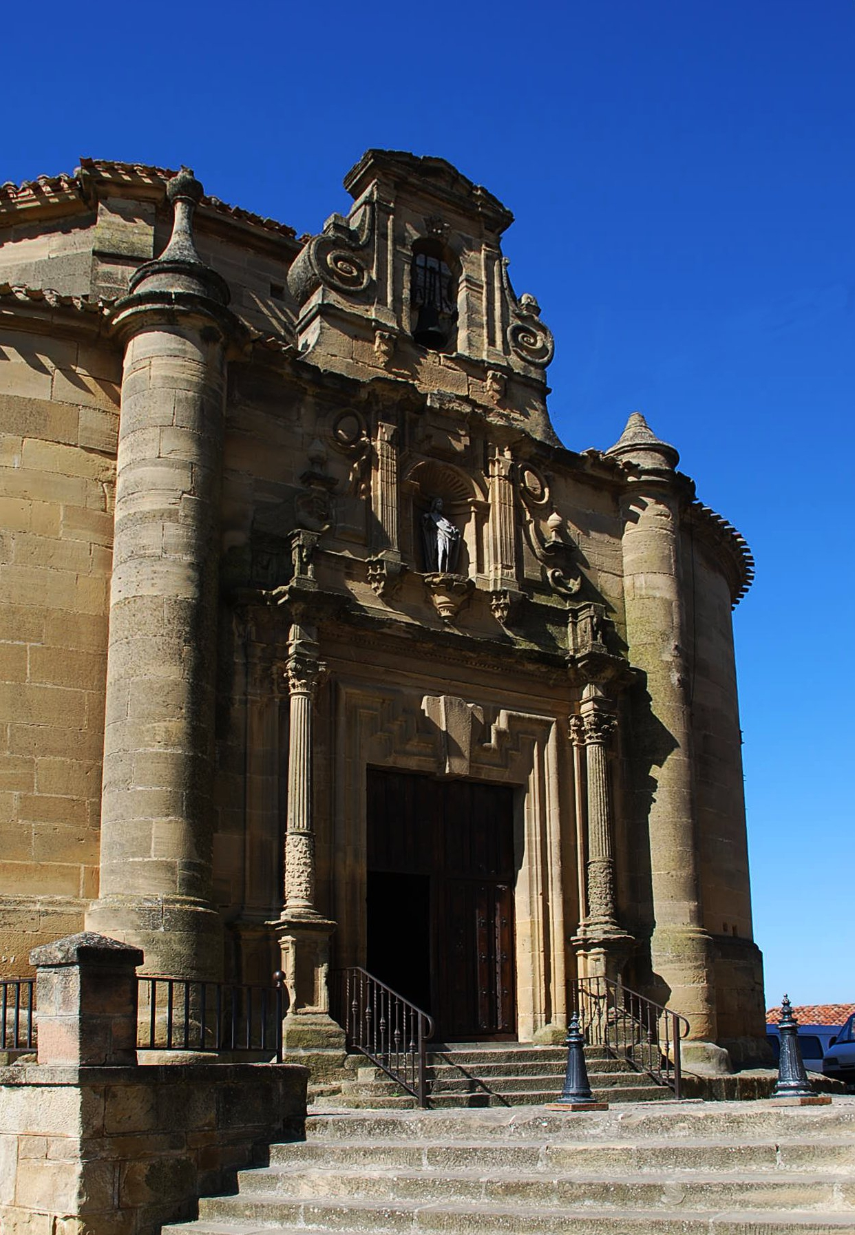 Ermita del Cristo de los Remedios en Briones (La Rioja - España).